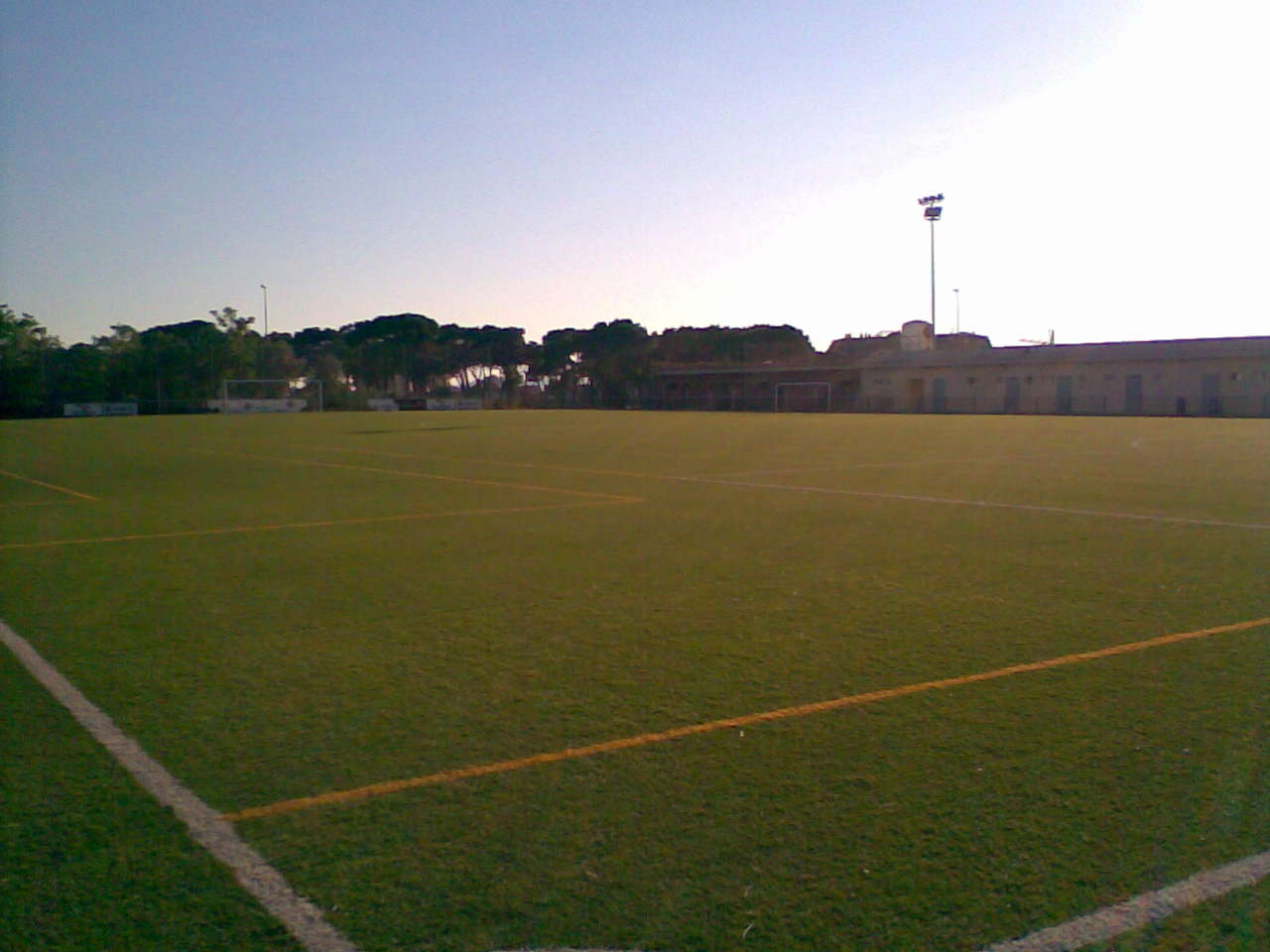 Finca de Canterac